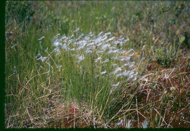 Scirpus_hudsonianus_1-eheep